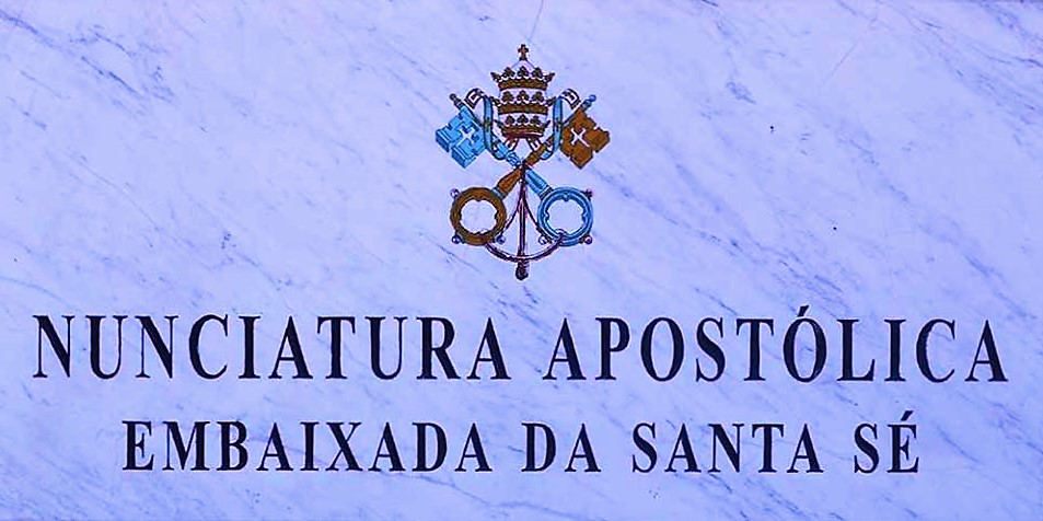 Nunciatura Apostólica Embaixada da Santa Sé, Dili